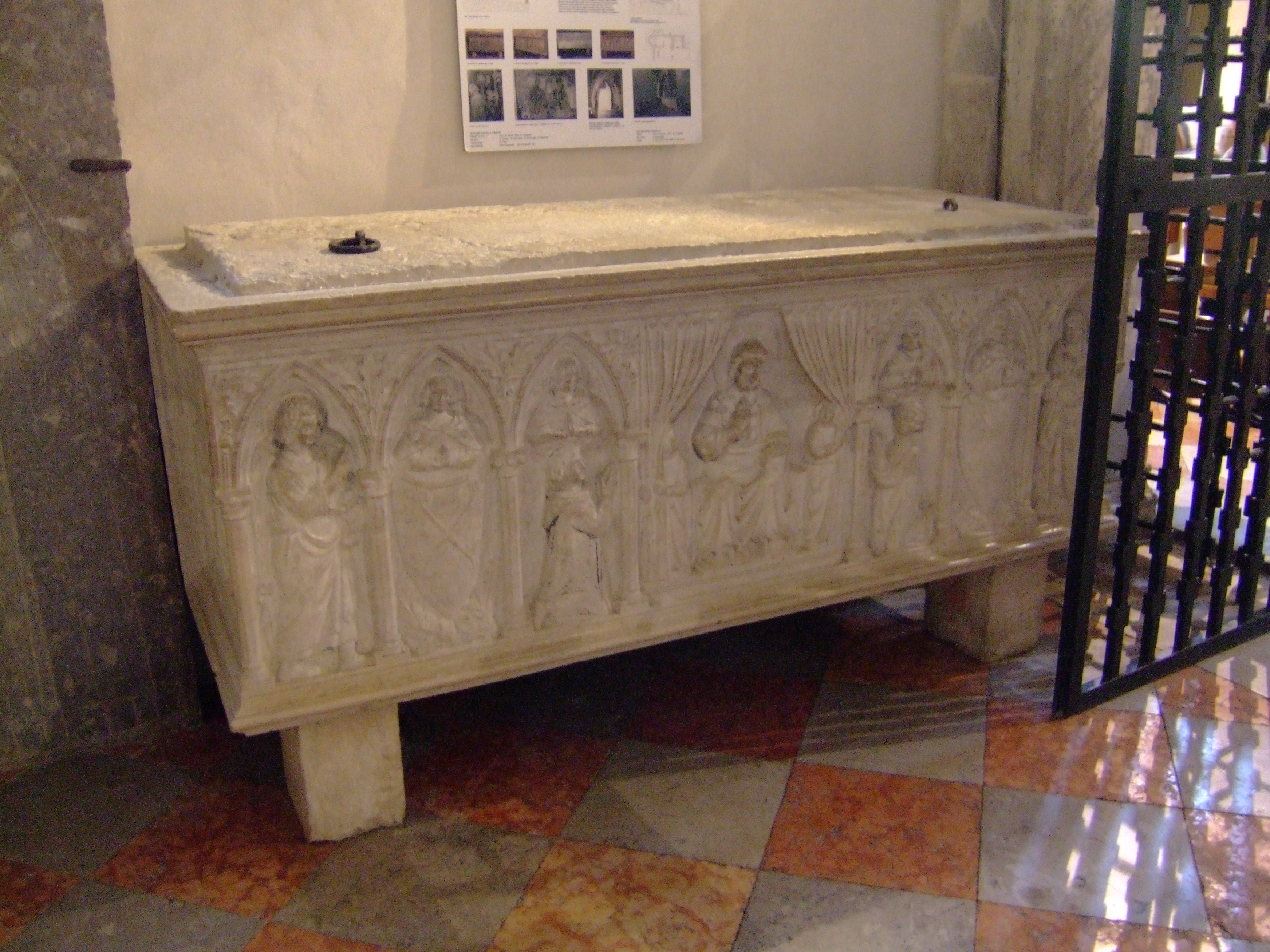 Aquileia - Basilica Patriarcale - Cappella di sant'Ambrogio Tomba del patriarca Ludovico della Torre